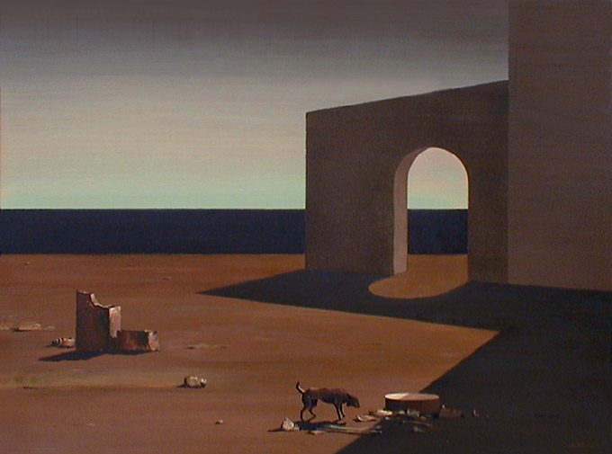 Ifjabb Benedek Jenő (Csongrád, 1939. június 13.– 2019. augusztus 20.) festőművész alkotása: Emlékezés egy délutánra, 1978, olaj, 60x80 cm